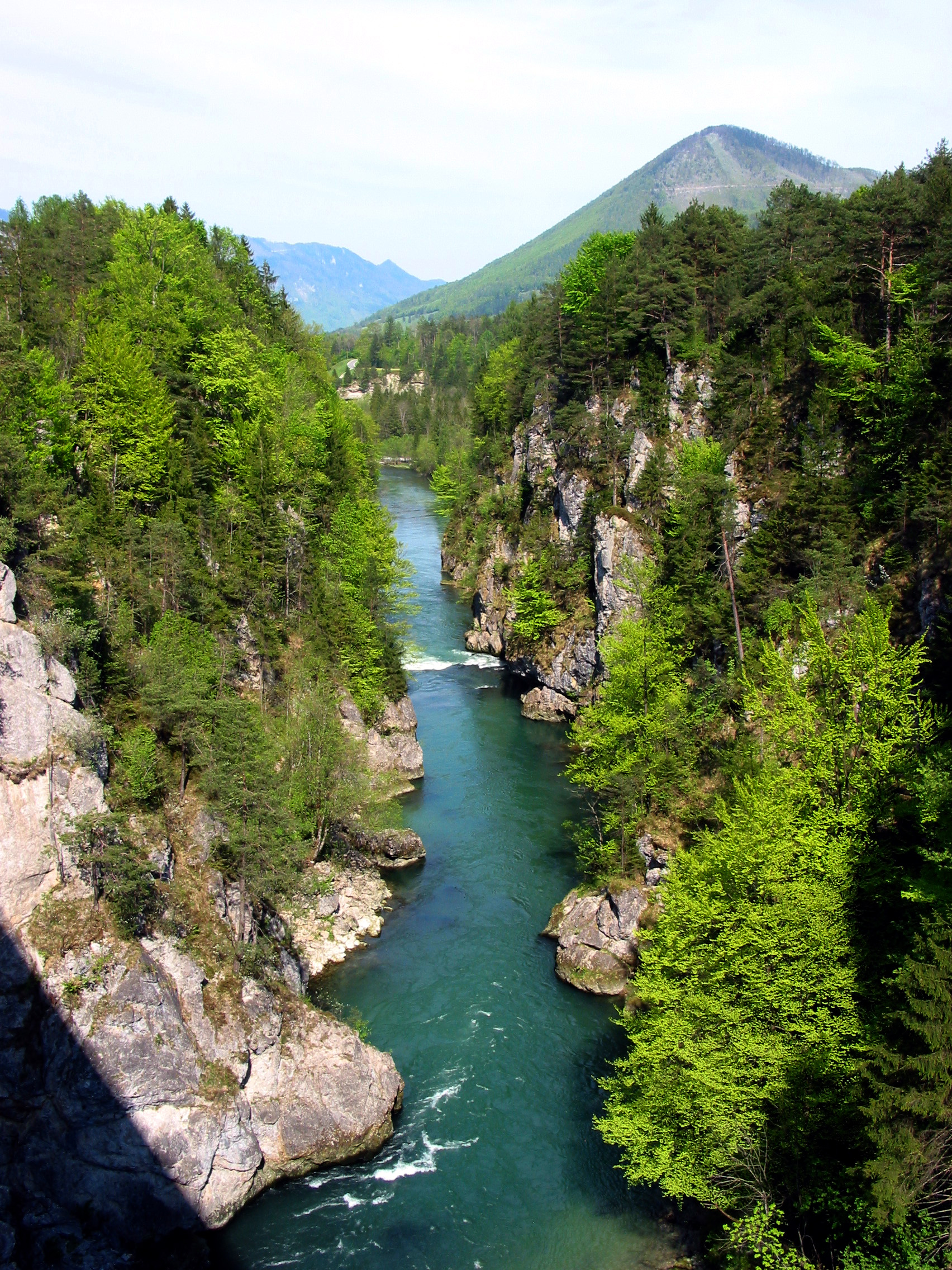 Steyrdurchbruch bei Frauenstein von der Straßenbrücke aus